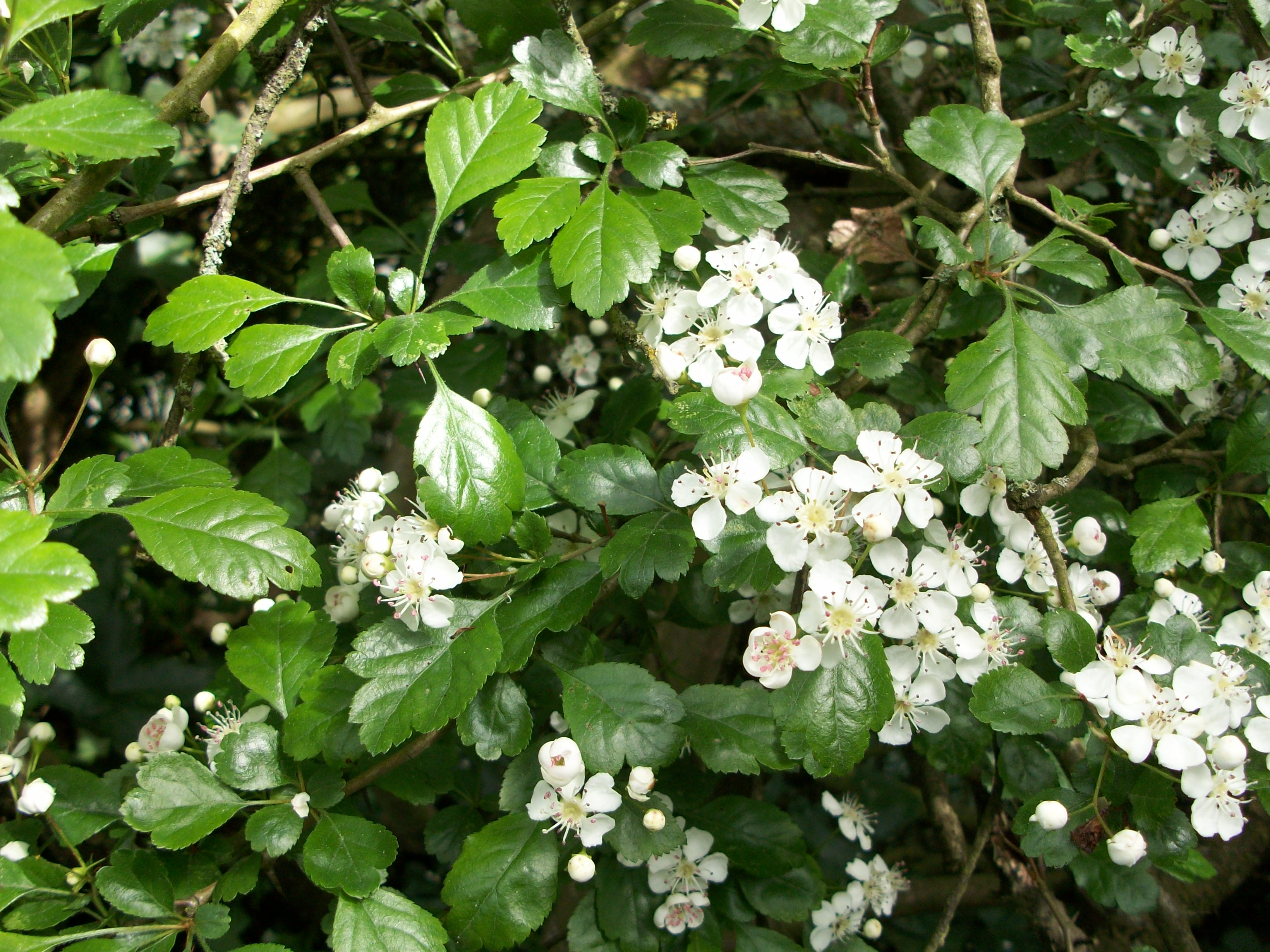 Le seul Crataegus laevigata trouvé sur la commune de Coudekerque-Branche. Sa floraison a lieu entre celle des pruneliers et des aubépines monogynes.